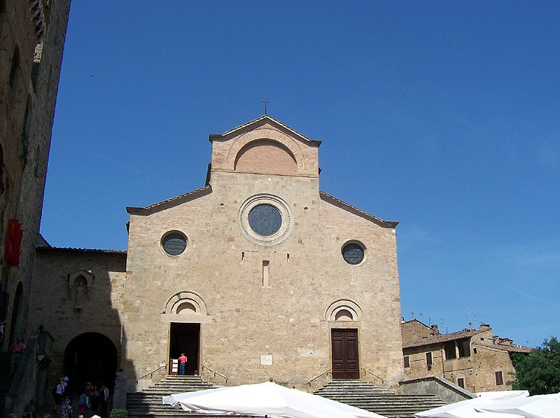 San Gimignano - Collegiata